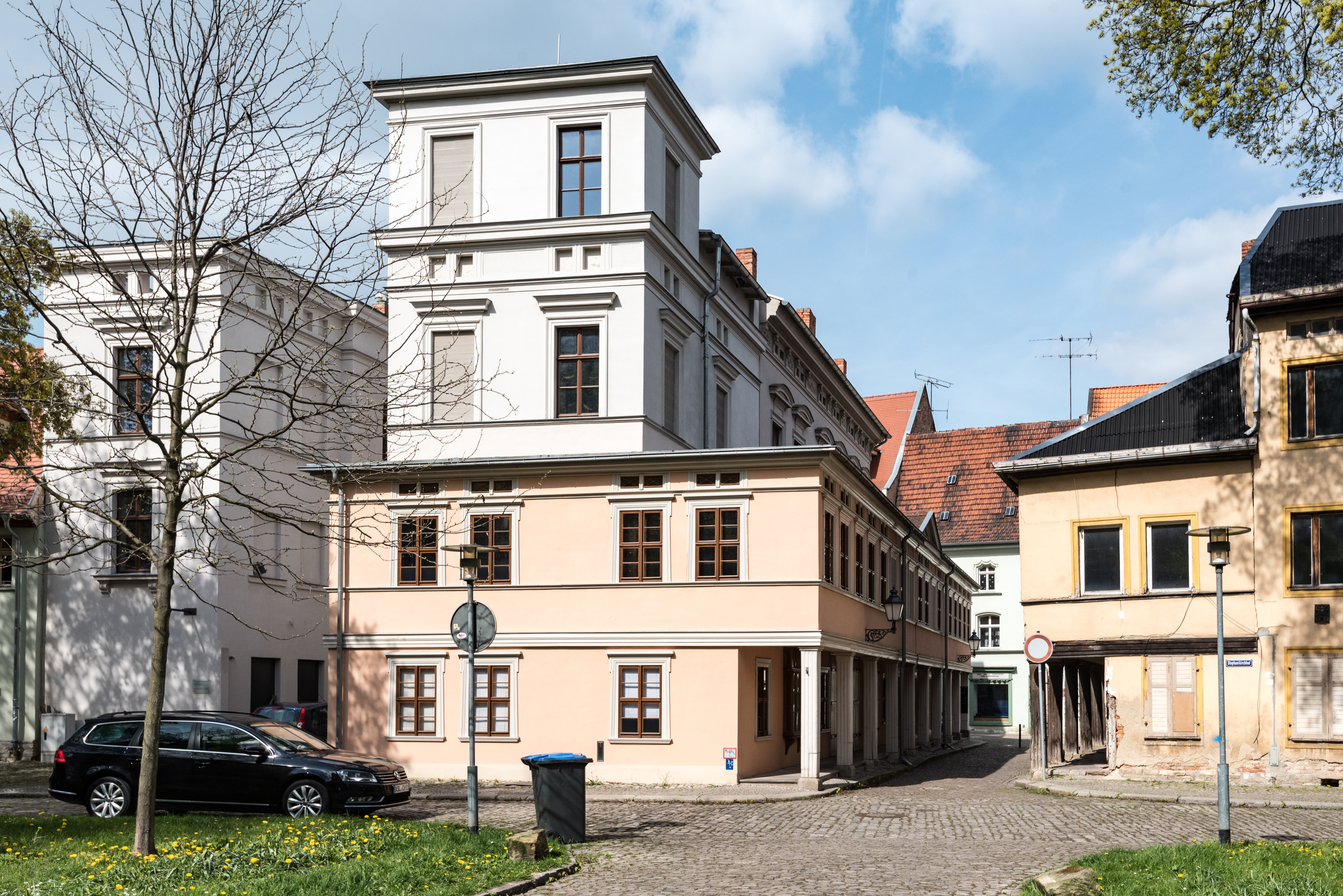 Aschersleben, Stephanikirchhof 20